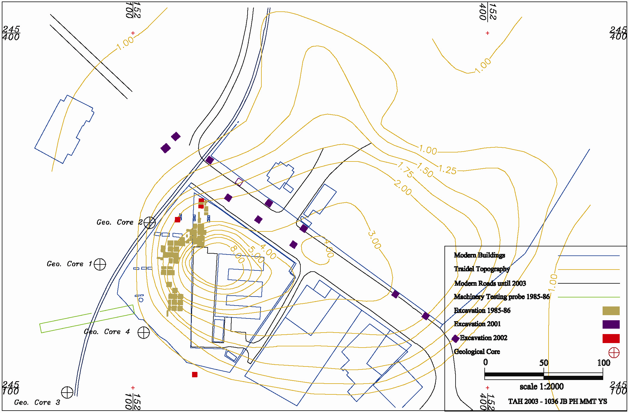 Tell Abu Hawam Excavation 2001 by Haifa University Israel. The head of the expedition was Professor Michal Artzy. משלחת חפירות ארכאולוגיות בתל אבו הואם שהתקיימה בשנת 2001 ע"י אוניברסיטת חיפה , החוג לציוויליזציות ימיות בראשות פרופ' מיכל ארצי. התל נמצא במפרץ חיפה והיה עיר נמל עתיקה באזור המפרץ מתקופת הברונזה המאוחרת ועד התקופה ההליניסטית This work is free and may be used by anyone for any purpose. If you wish to use this content, you do not need to request permission as long as you follow any licensing requirements mentioned on this page.